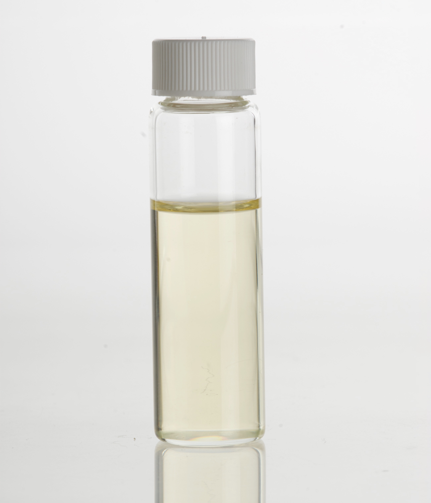 Envase con Aceite esencial Petit-Grain